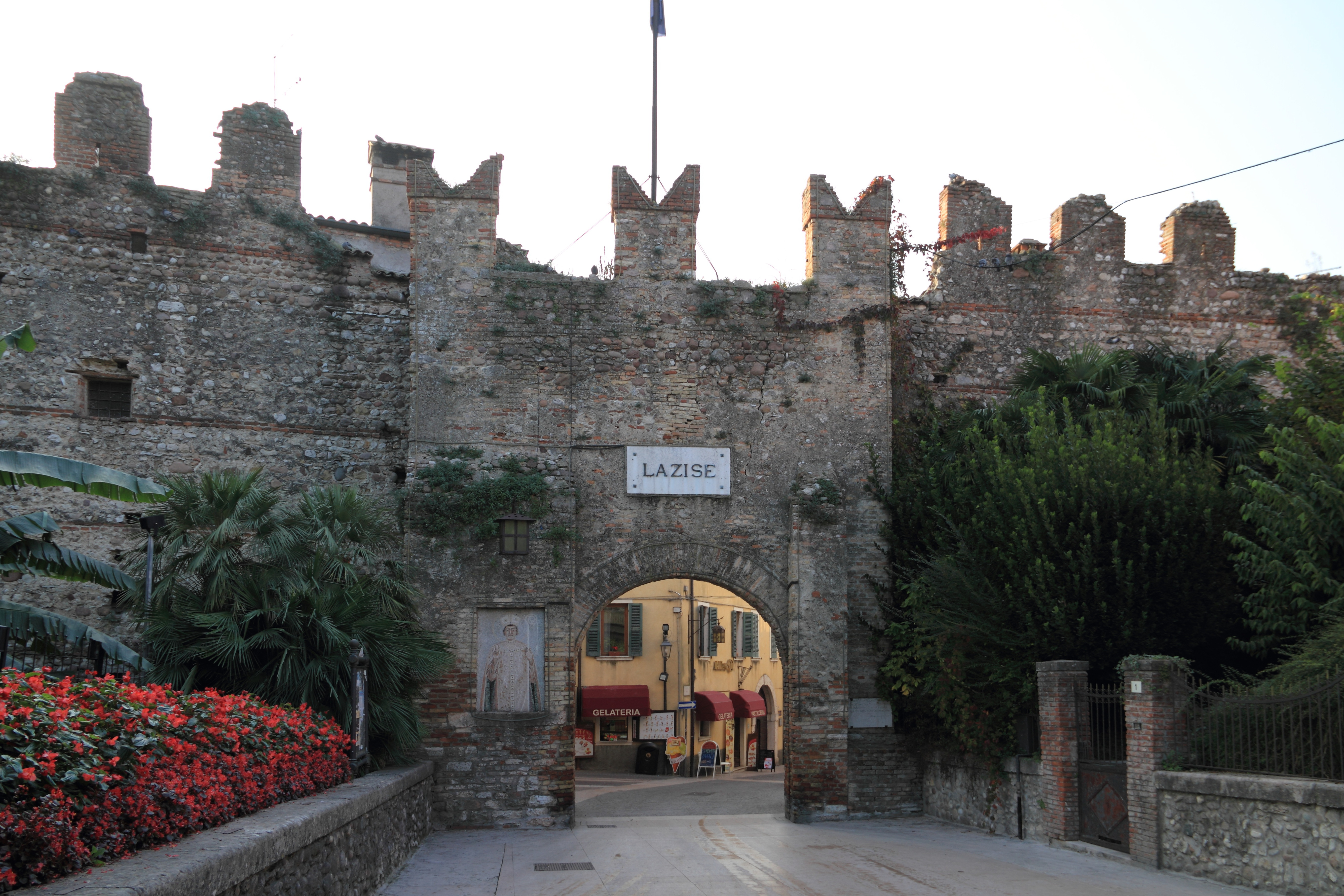 Ein Stadttor in der Stadtmauer von Lazise.